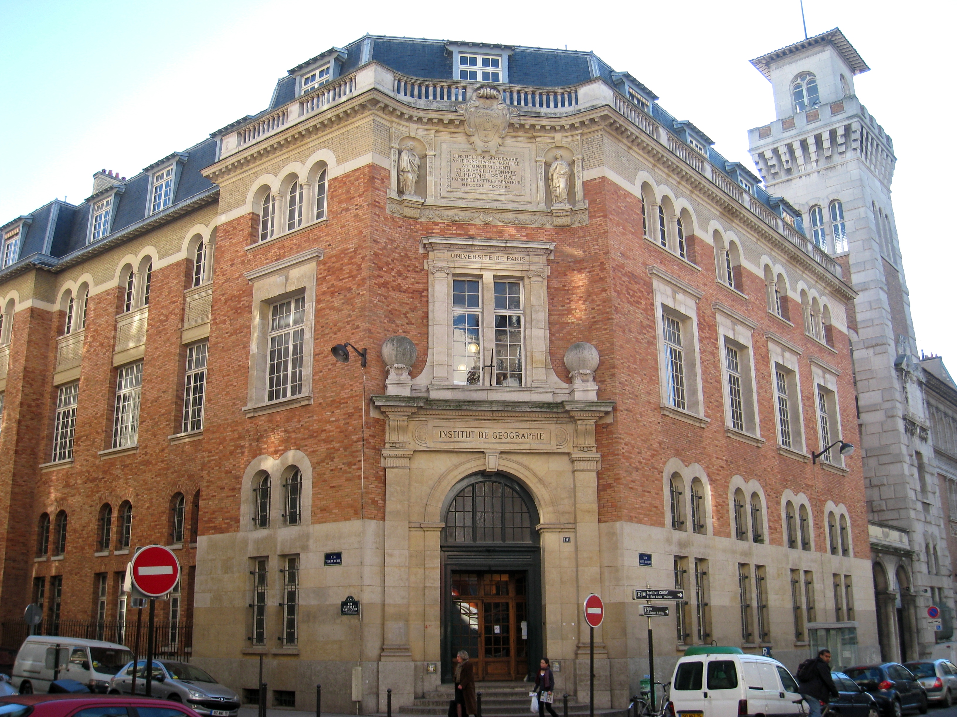 Institut de Géographie, Sorbonne Paris IV, 191, Rue Saint-Jacques, Paris, France - exterior view. Architect: Henri Paul Nénot.